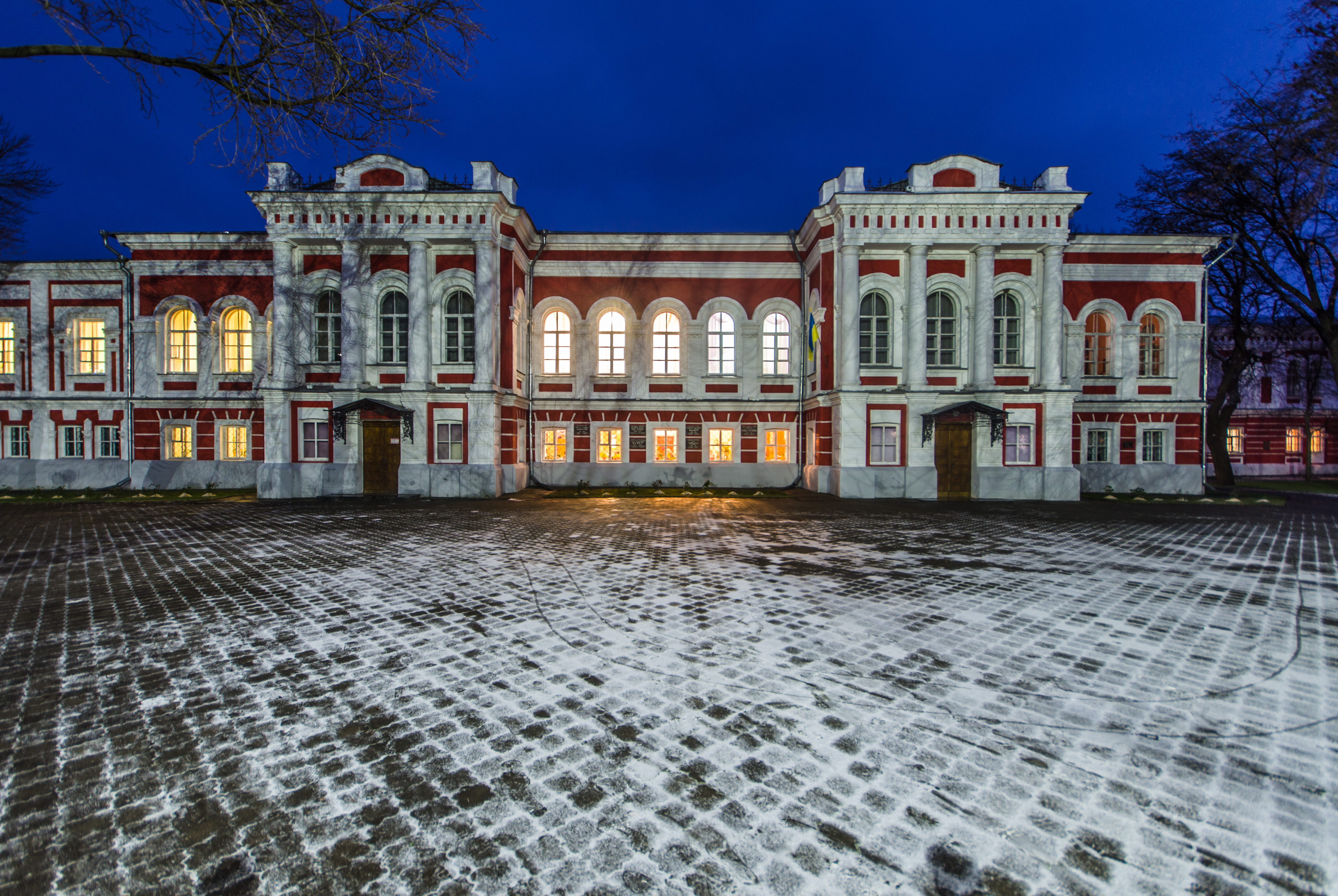 Гуманітарно-просвітницький комплекс, Глухів, вул. Києво-Московська, 24